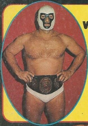 Mr Wrestling II en couverture du magazine de catch Wrestling Yearbook de l'été 1977.